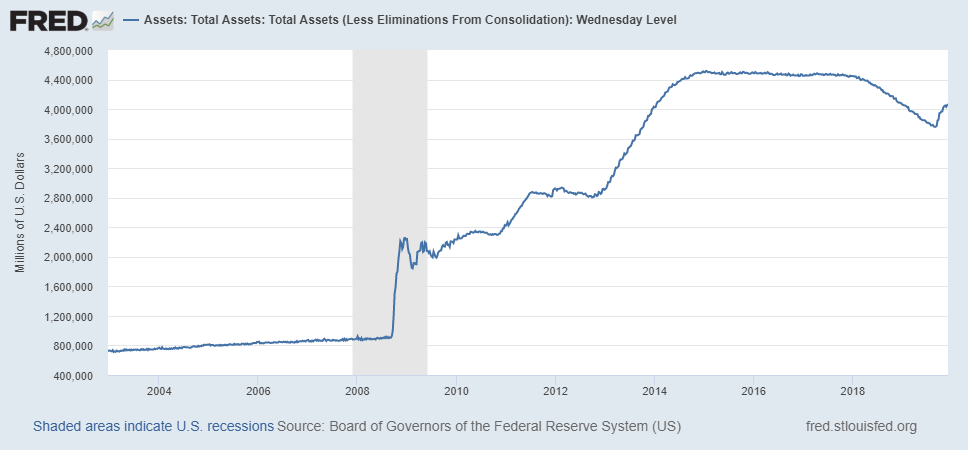 Föderaalreservi bilanss aastatel 2004-2019